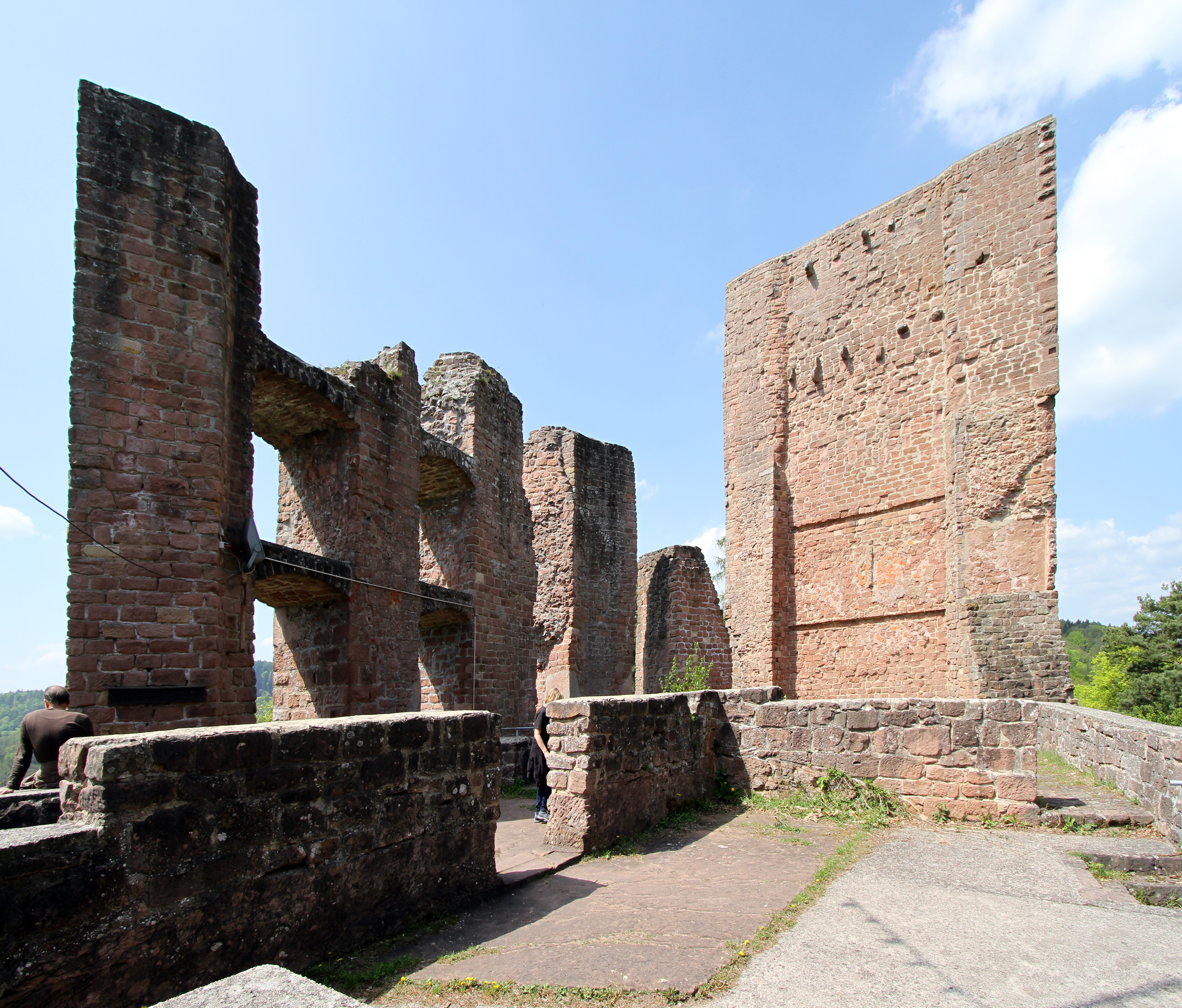 Ruine Ramburg in der Pfalz